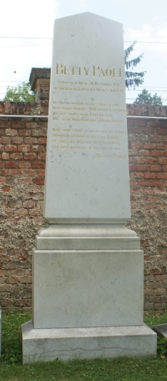 Wiener Zentralfriedhof-Betty Paoli